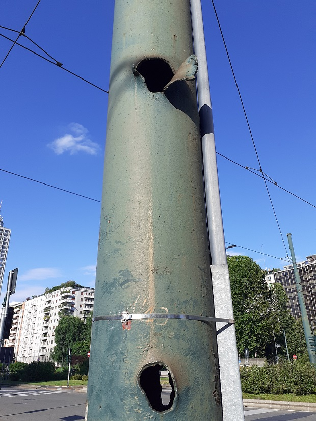 Pali dei fili del tram in Piazza Repubblica a Milano